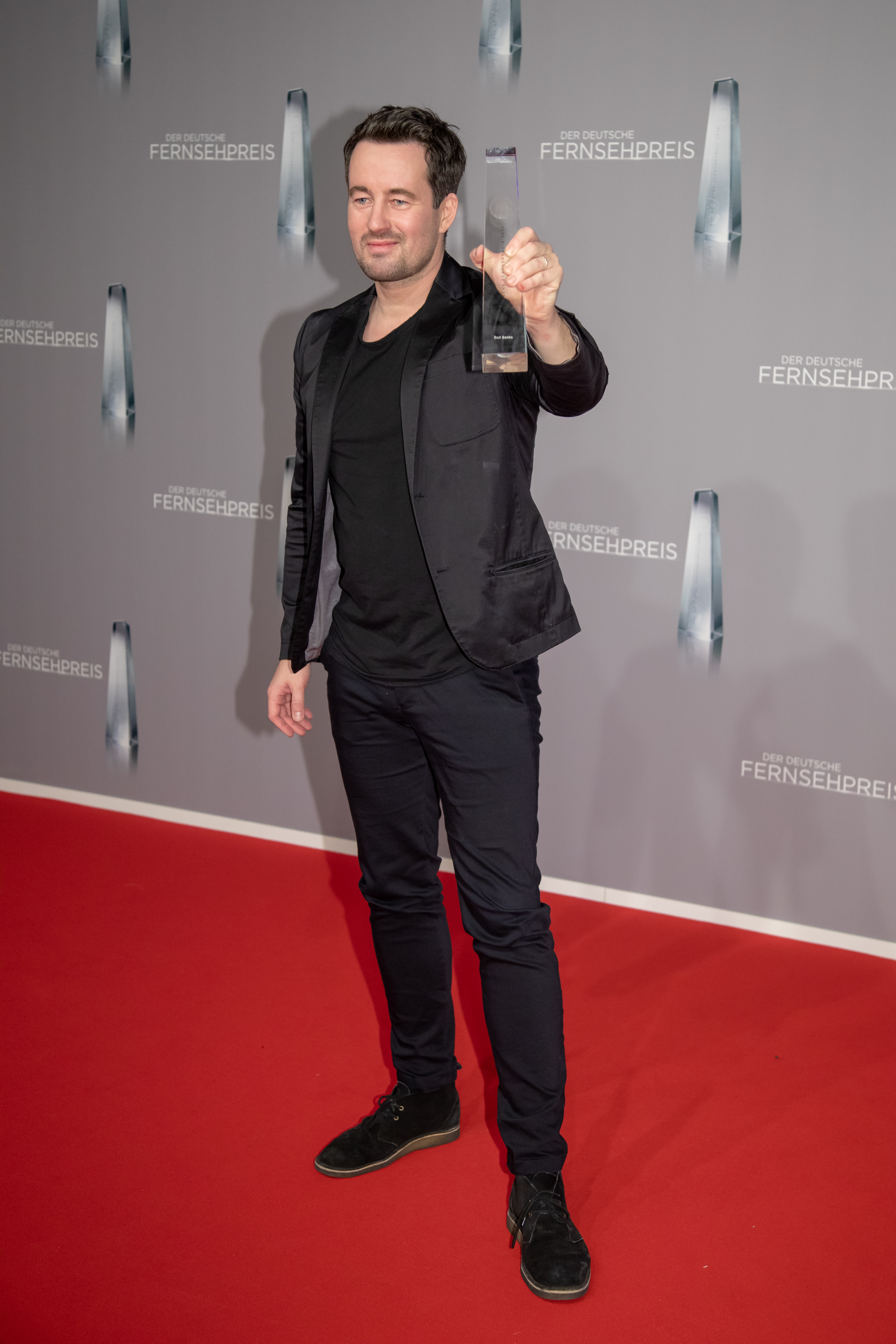 Christian Schwochow beim Deutschen Fernsehpreis 2019 in der Düsseldorfer Rheinterrasse